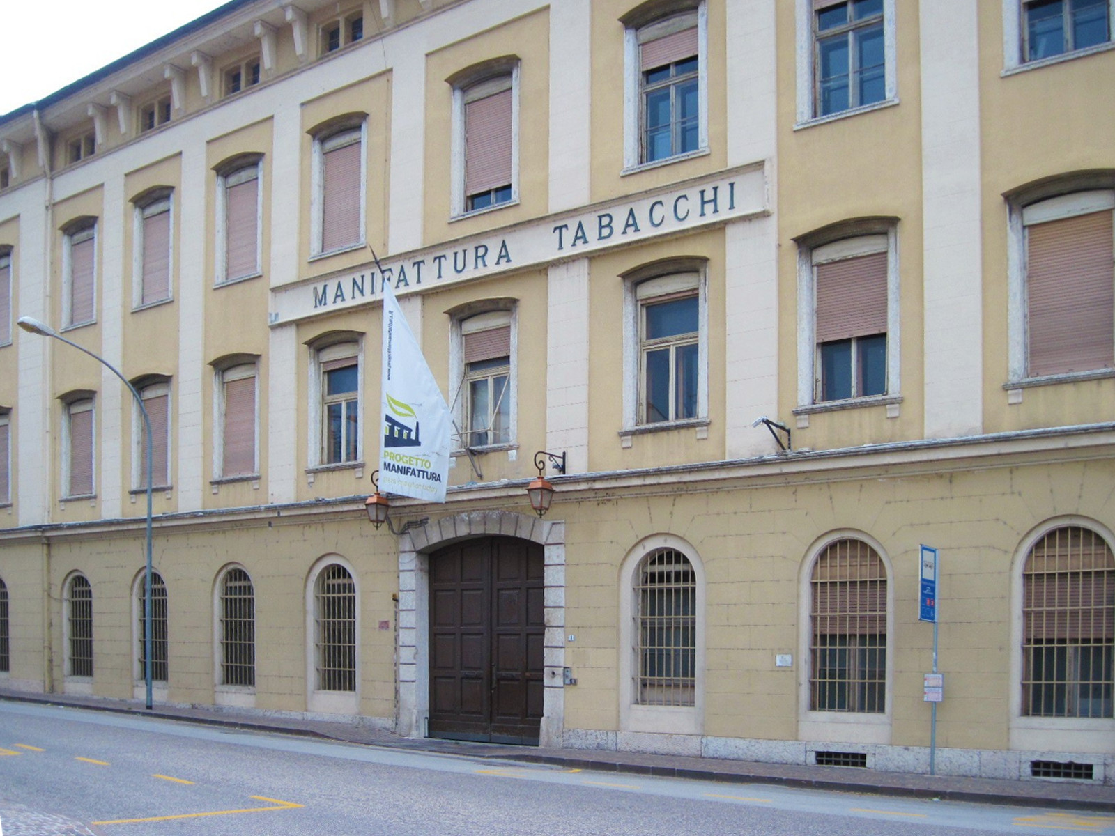 Ex Manifattura Tabacchi di Rovereto con la bandiera del Progetto Manifattura